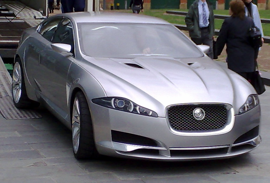 Jaguar XF